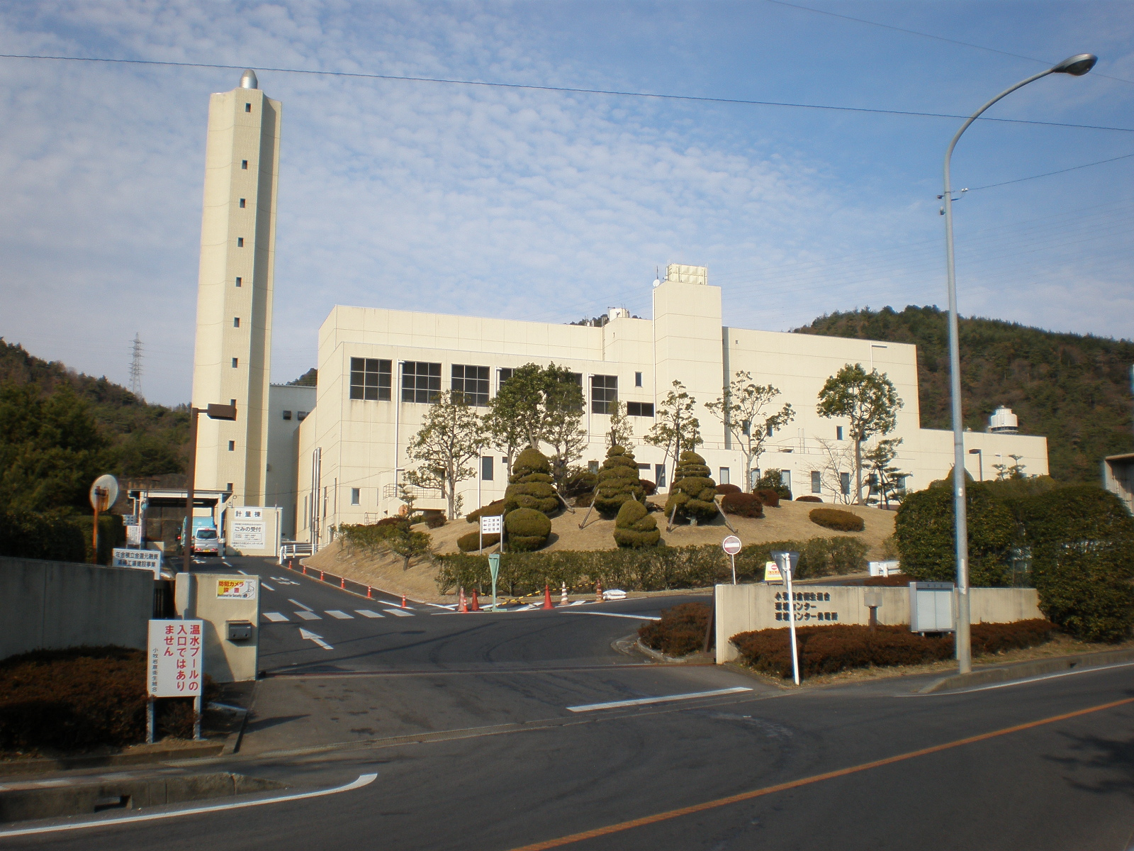 愛知県小牧市にある小牧岩倉衛生組合環境センター